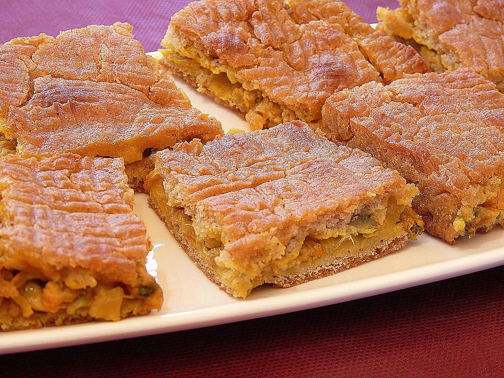 Empanada de millo, na casa de Porto en Barro